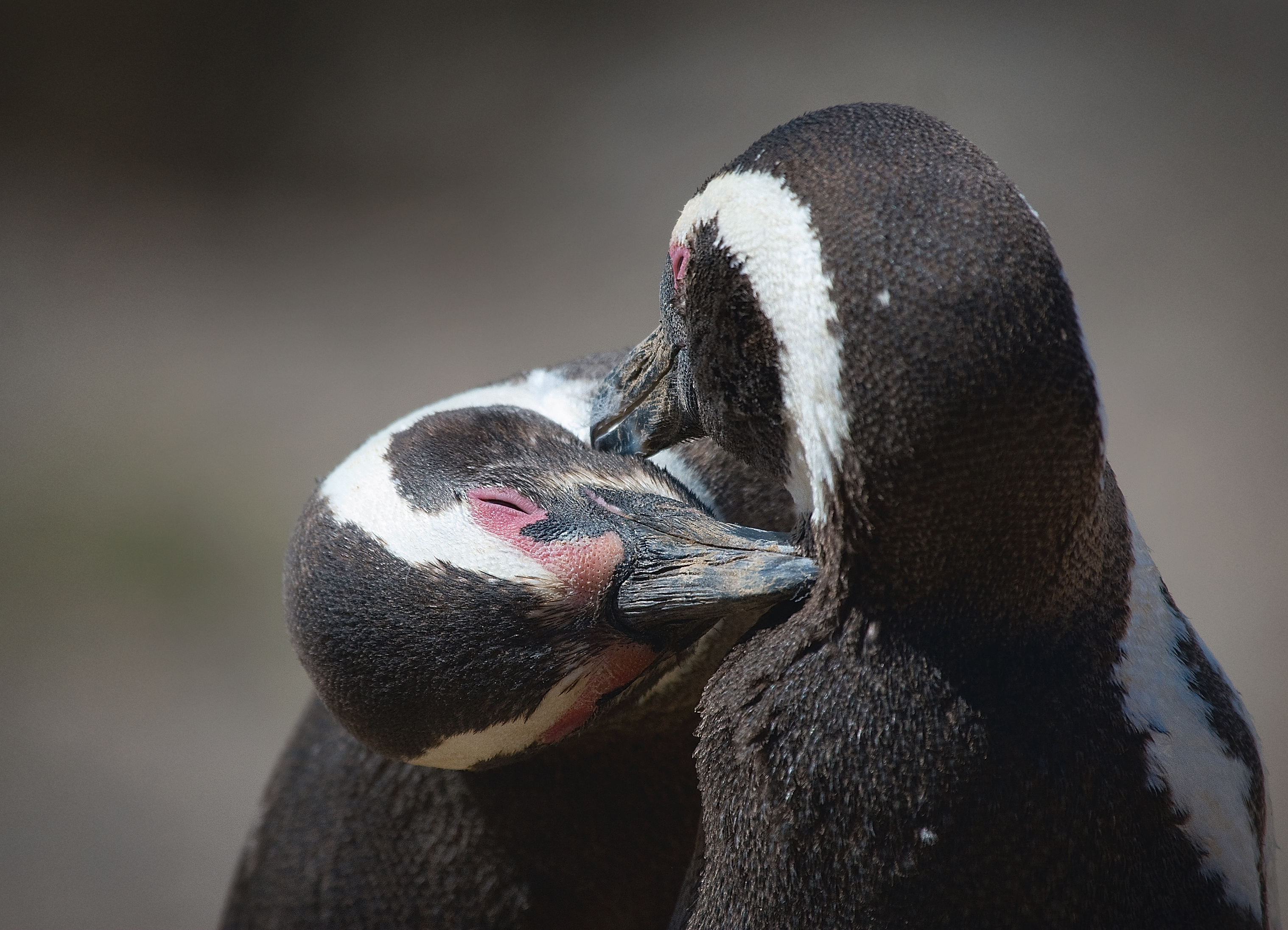 Magellanic penguin (Spheniscus magellanicus), Valdes Peninsula, Argentina